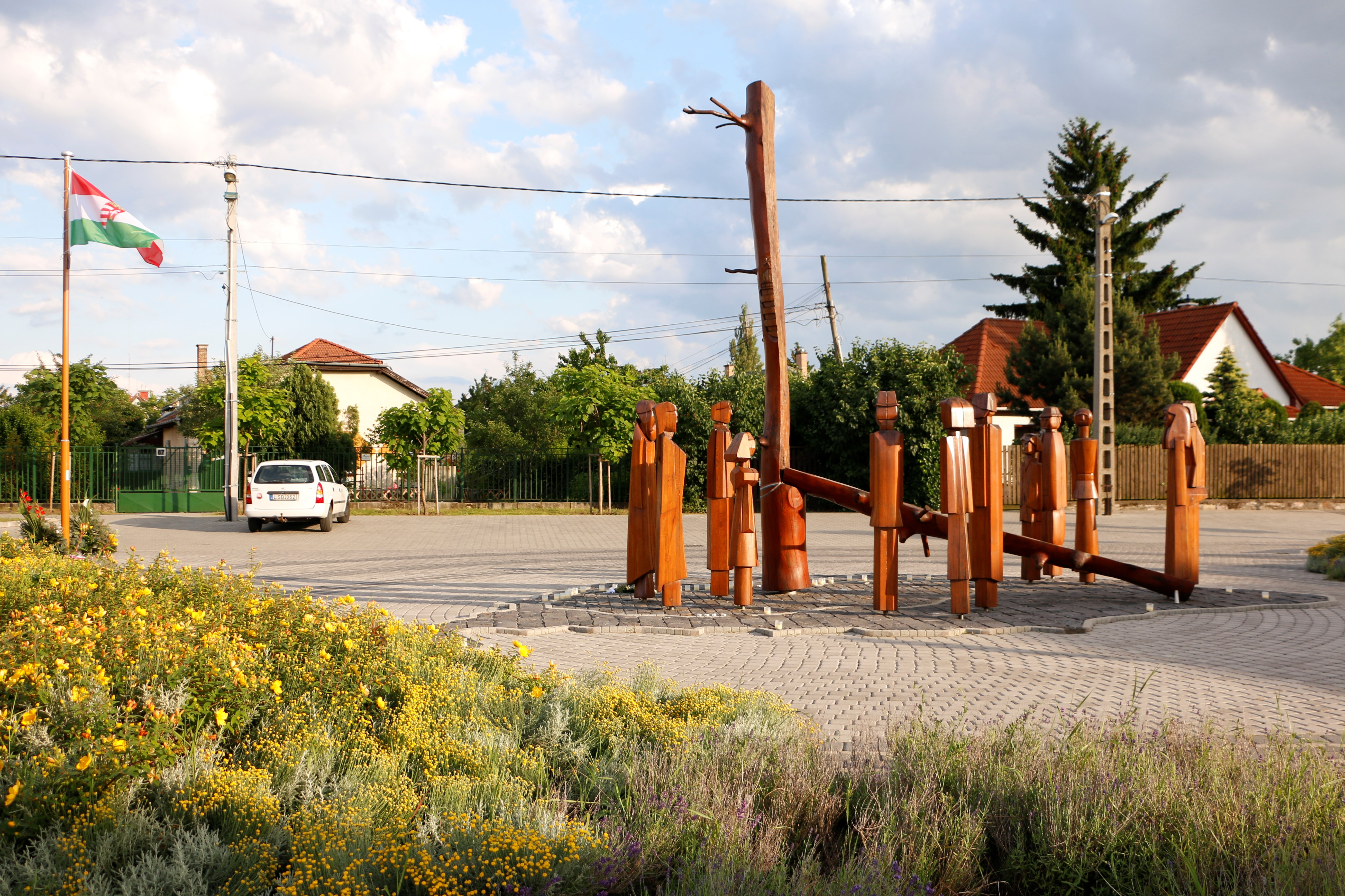 Trianon-emlékmű Budapest XVI. kerületében, Sashalom és Rákosszentmihály határán. Duffek Tivadar és Csibi László alkotását 2013. június 4-én avatták.